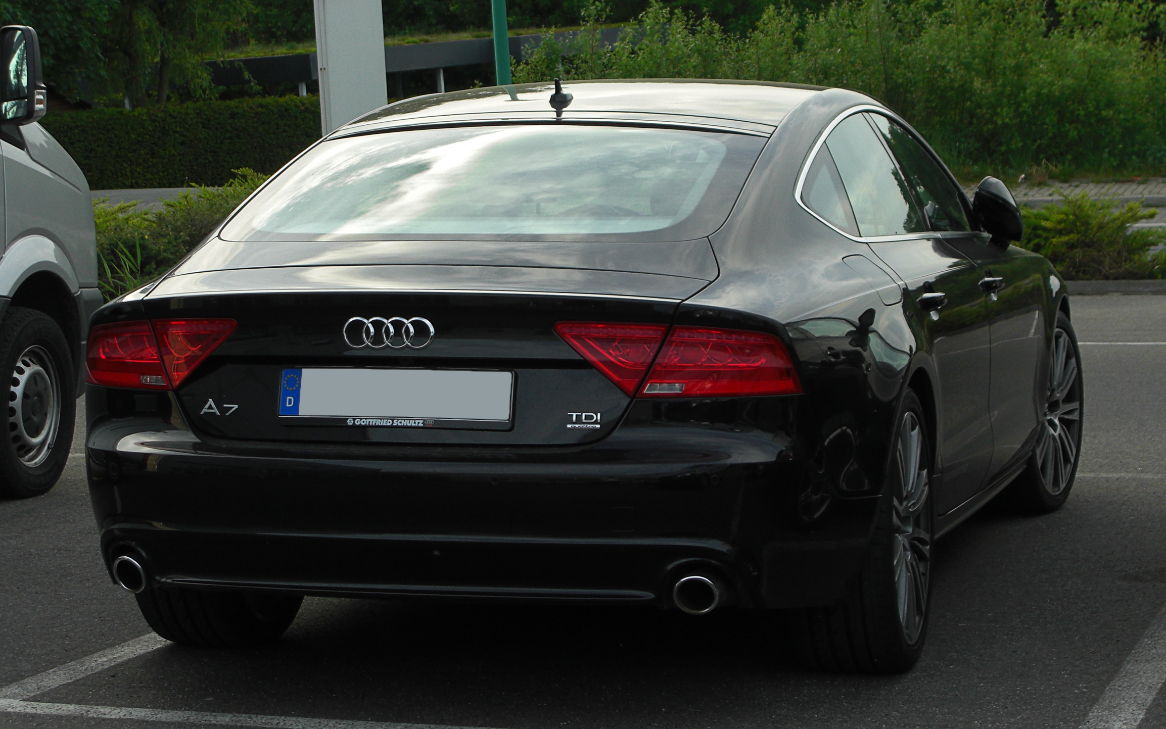 Audi A7 Sportback 3.0 TDI quattro